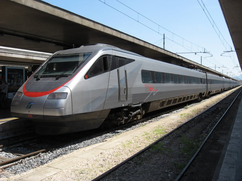 ETR 480 ad alta velocità alla stazione di Roma Termini.